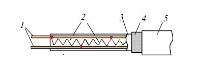 Kaabli läbilõge